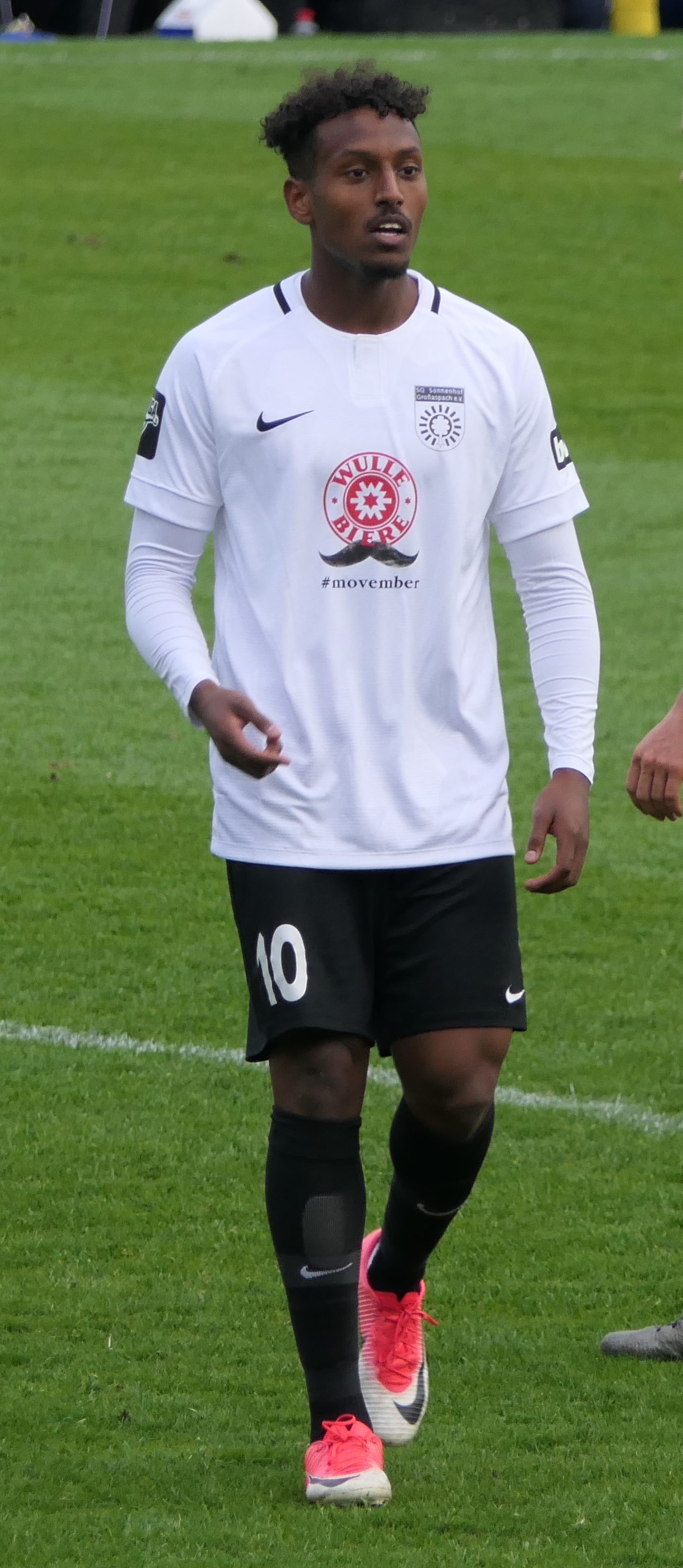 Der Fussballprofi Joel Gerezgiher im Trikot der SG Sonnenhof Großaspach beim Heimspiel gegen Eintracht Braunschweig am 03.11.2018.